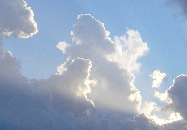 Chmury - Clouds - Polska - Poland - Lato - Summer - 2006 Autor: Krzysztof